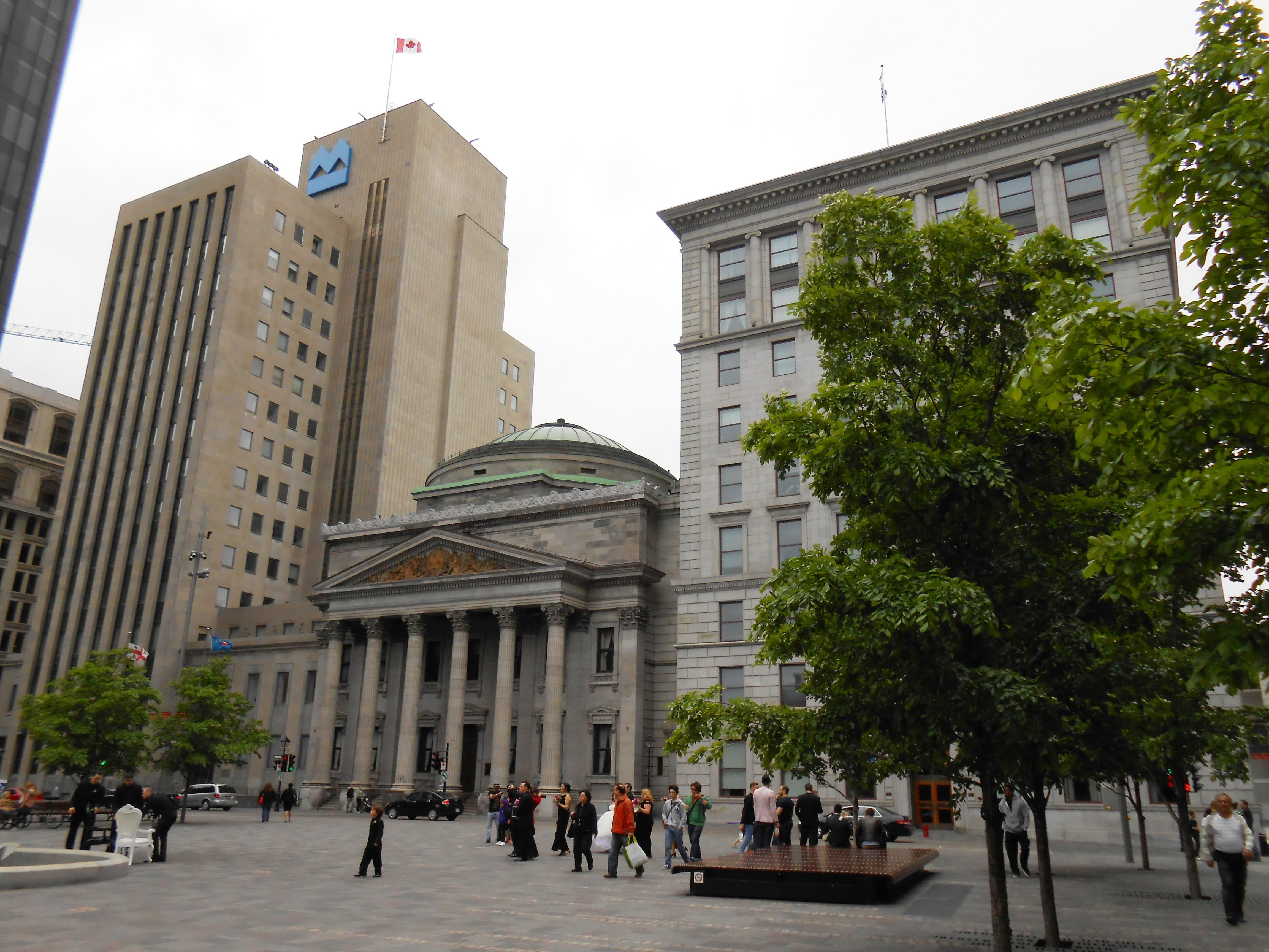 Le siège social de la Banque de Montréal, au 129, rue Saint-Jacques à Montréal. Construit en 1845 sur des plans de John Wells.